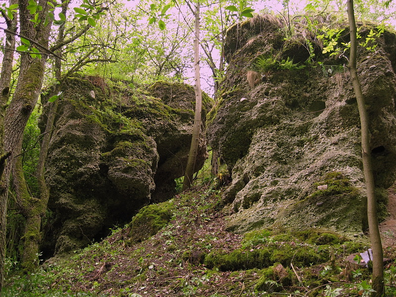 Калодзежны Роў. Скопішча груд валунна-галечнага кангламерату "Прынёманскае"